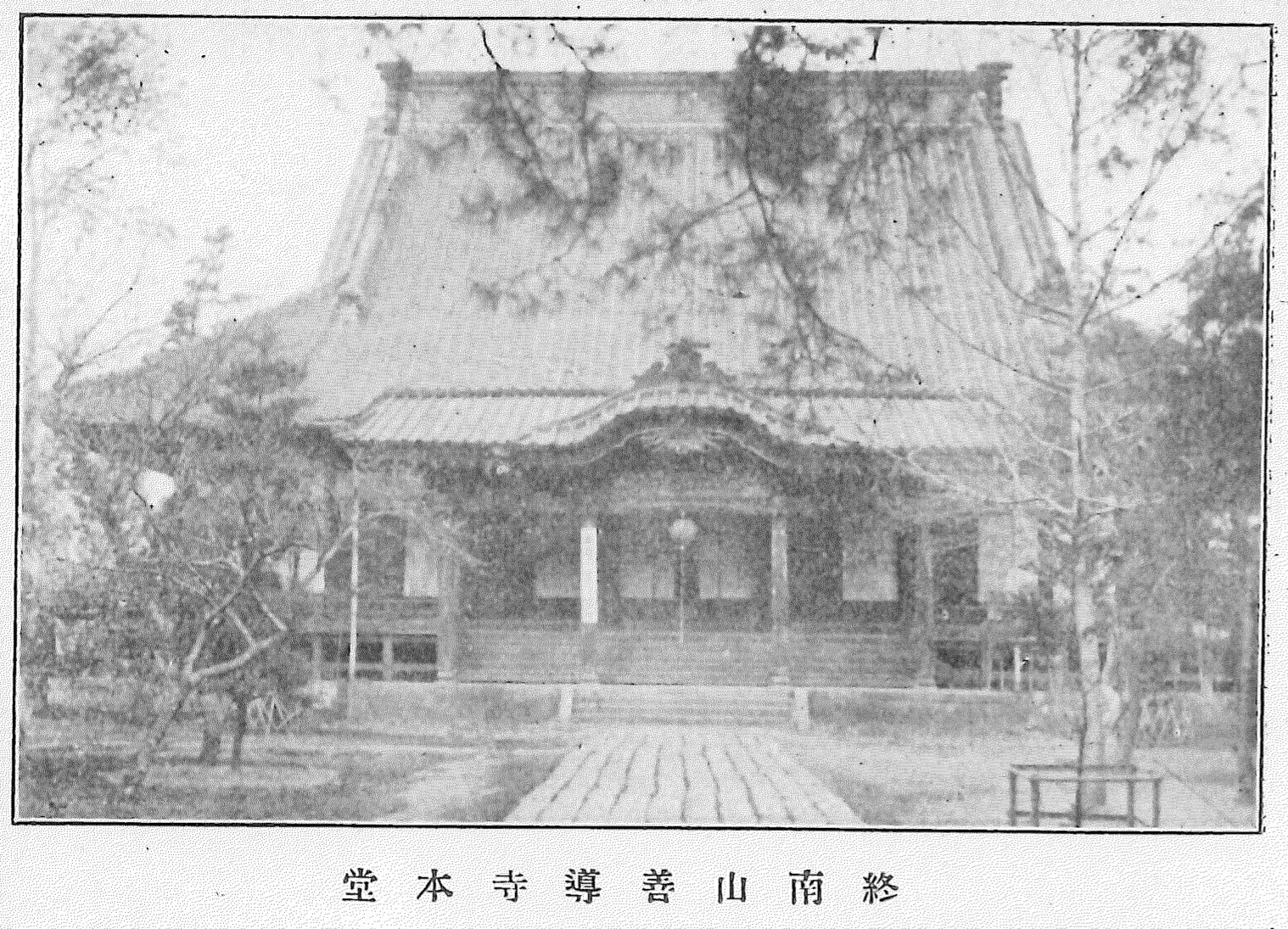 館林、谷越町にあった頃の善道寺本堂